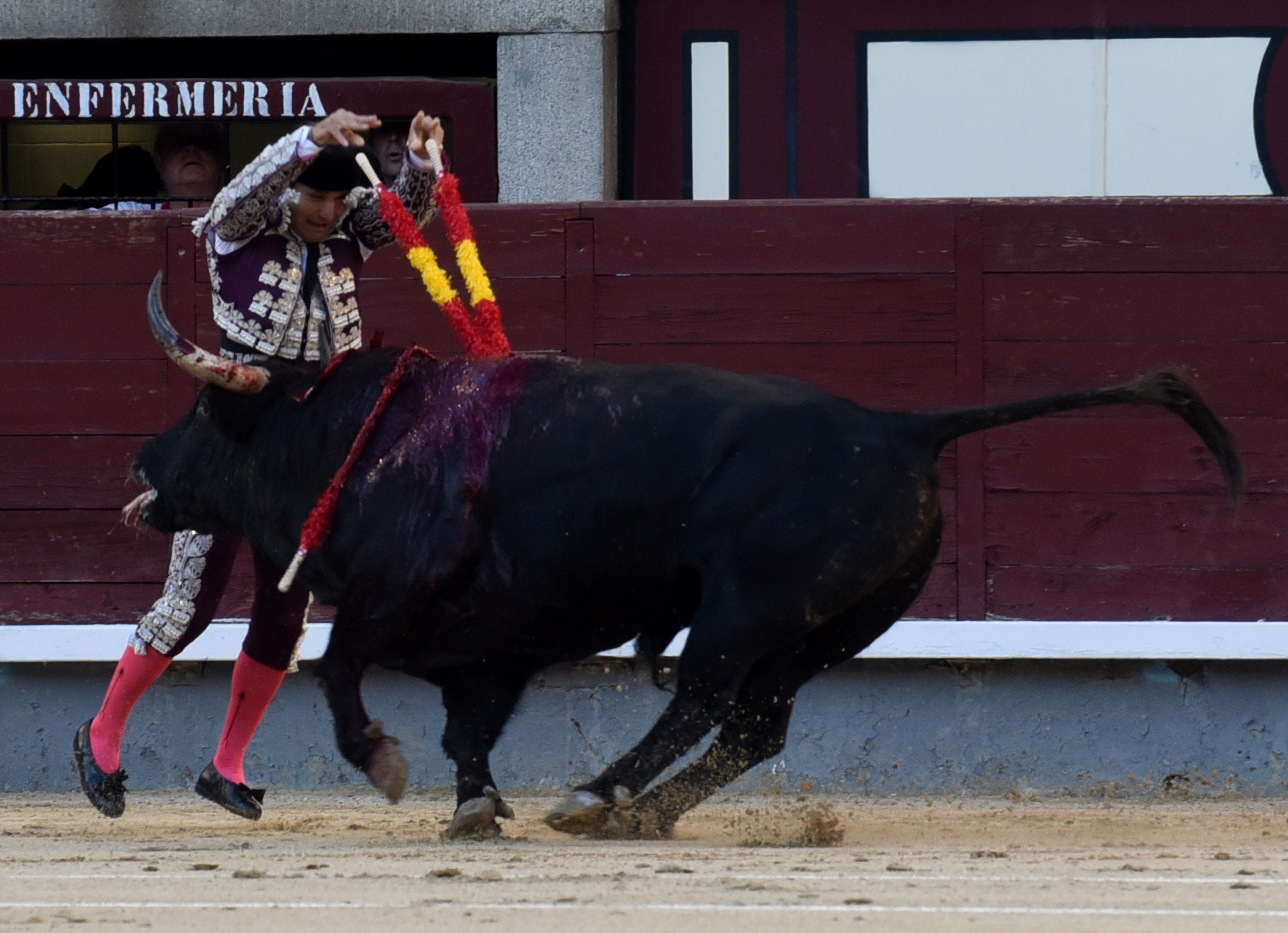 Tras cargar la suerte con evidente exposición, el banderillero ha clavado en su sitio el par, reunido, y ya inicia la salida.